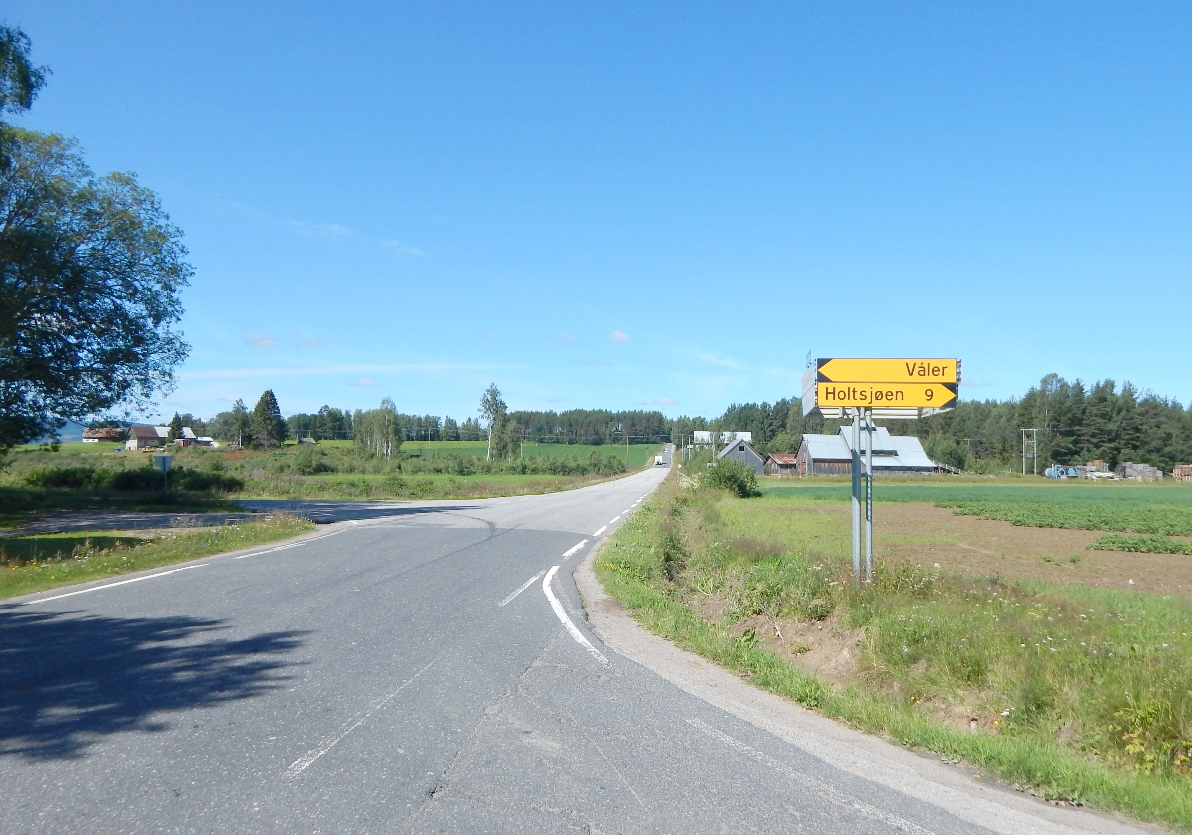 Svenskevegen (FV455) krysser FV496.